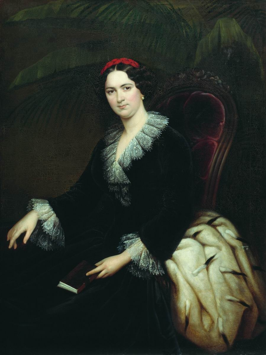 Портрет княгини Грузинской Анны Алексеевны (1824-1866), урождённой Мазуриной. Холст, масло